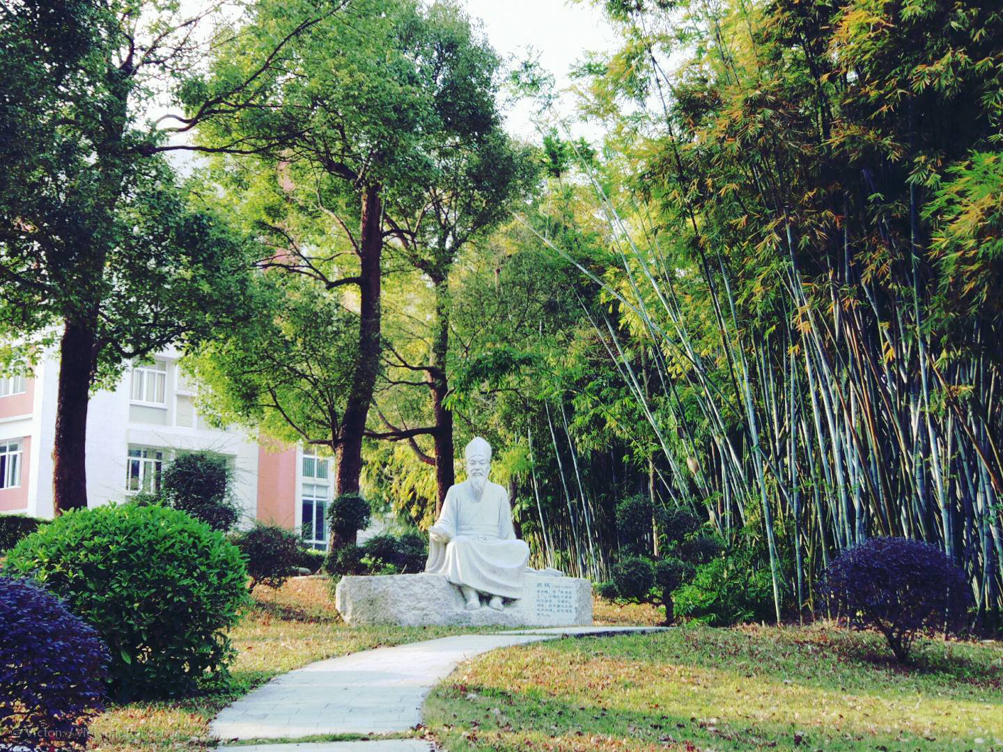 广州市第二中学科学城校区东坡（苏轼）像